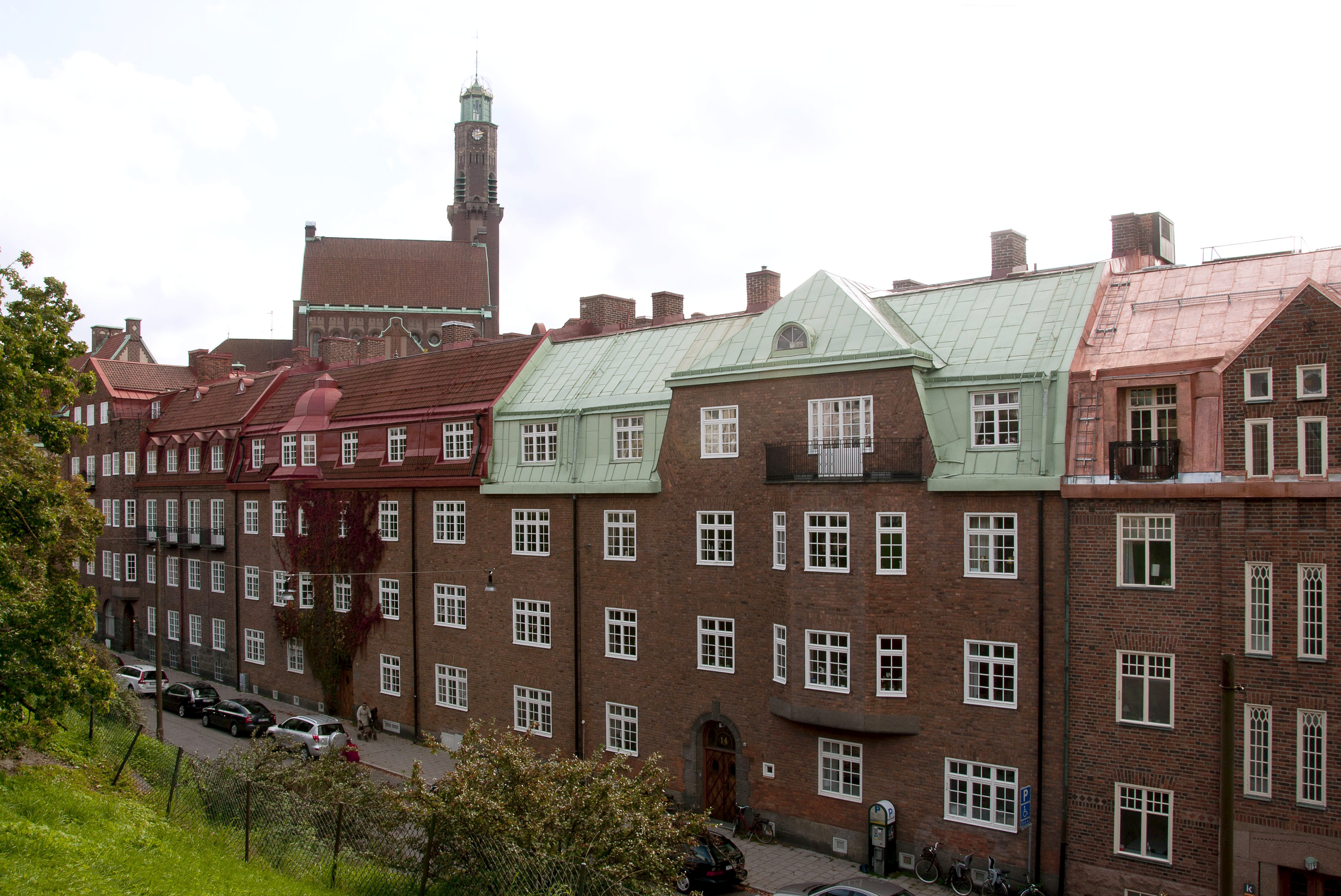 Östermalmsgatan 10-18 sedd från Balders hage. Från vänster; Östermalmsgatan 18/Engelbrekts Kyrkogata 7 (Sidensvansen 5): Byggnadsår 1917-18, arkitekt l) I Engström, 2) Risborg & Holmqvist, byggherre C Christensson & I Engström, byggmästare Byggnads AB Sidensvansen - I Engström. Östermalmsgatan 16 (Sidensvansen 4): Byggnadsår 1916-17, arkitekter Kjellgren & Hammarling, byggherre H Brusell, byggmästare A E Klasén. Östermalmsgatan 14 (Sidensvansen 3): Byggnadsår 1916-17, arkitekter Kjellgren & Hammarling, byggherre H Brusell, byggmästare A E Klasén. Östermalmsgatan 10, 12 (Sidensvansen 2): Byggnadsår 1914-16, arkitekt I Engström, byggherre E Cronvall, byggmästare I Engström.